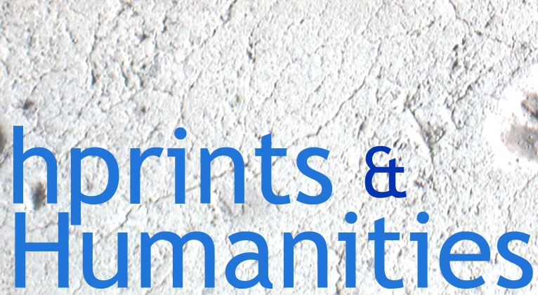 hprints.orgs logo 2008 af informationsspecialist Sakena Ali. Logoets baggrund er 6000 år gamle mennekespor (human prints) i vulkansk mudder i Managua, Nicaragua. Hprints logo (marts 2008)